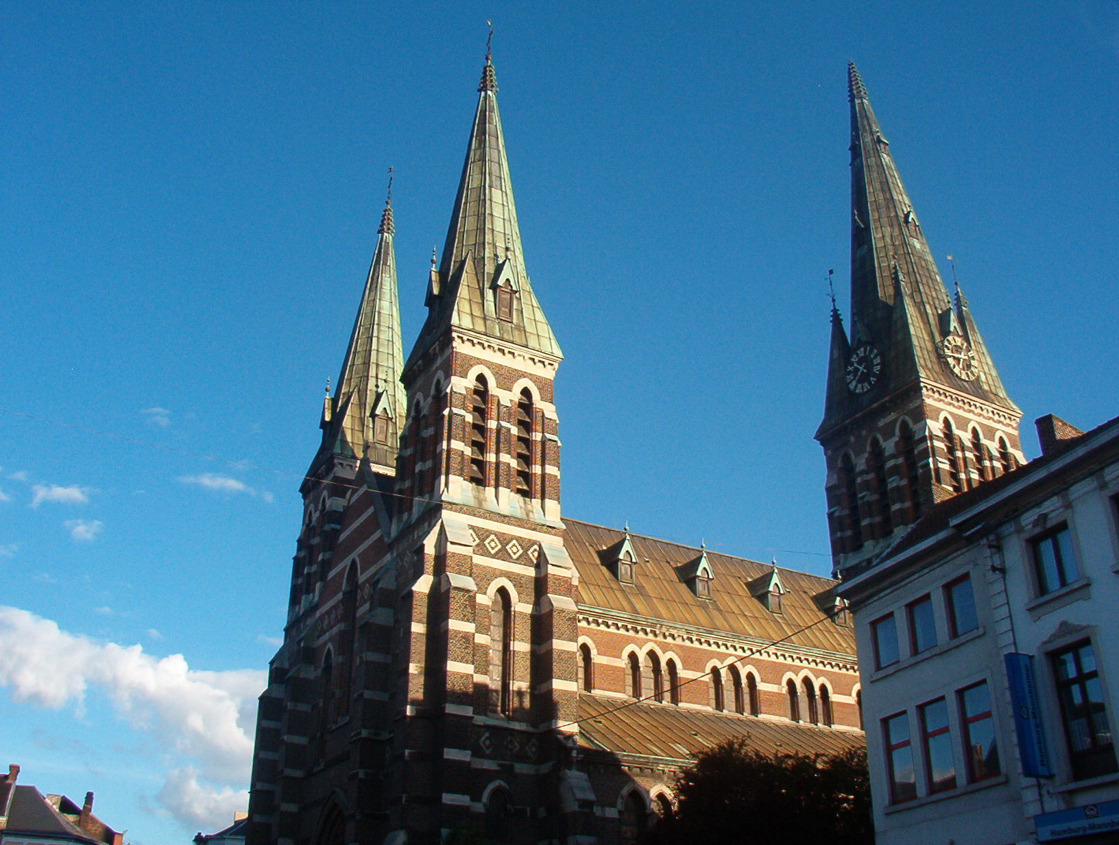 Photo personnelle prise en juin 2004 par ghostal.